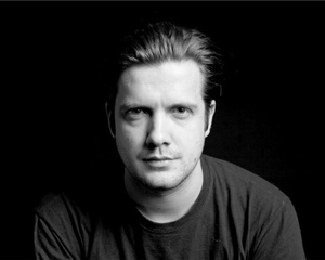 Christoph Jöde Theater Doetmund 2012